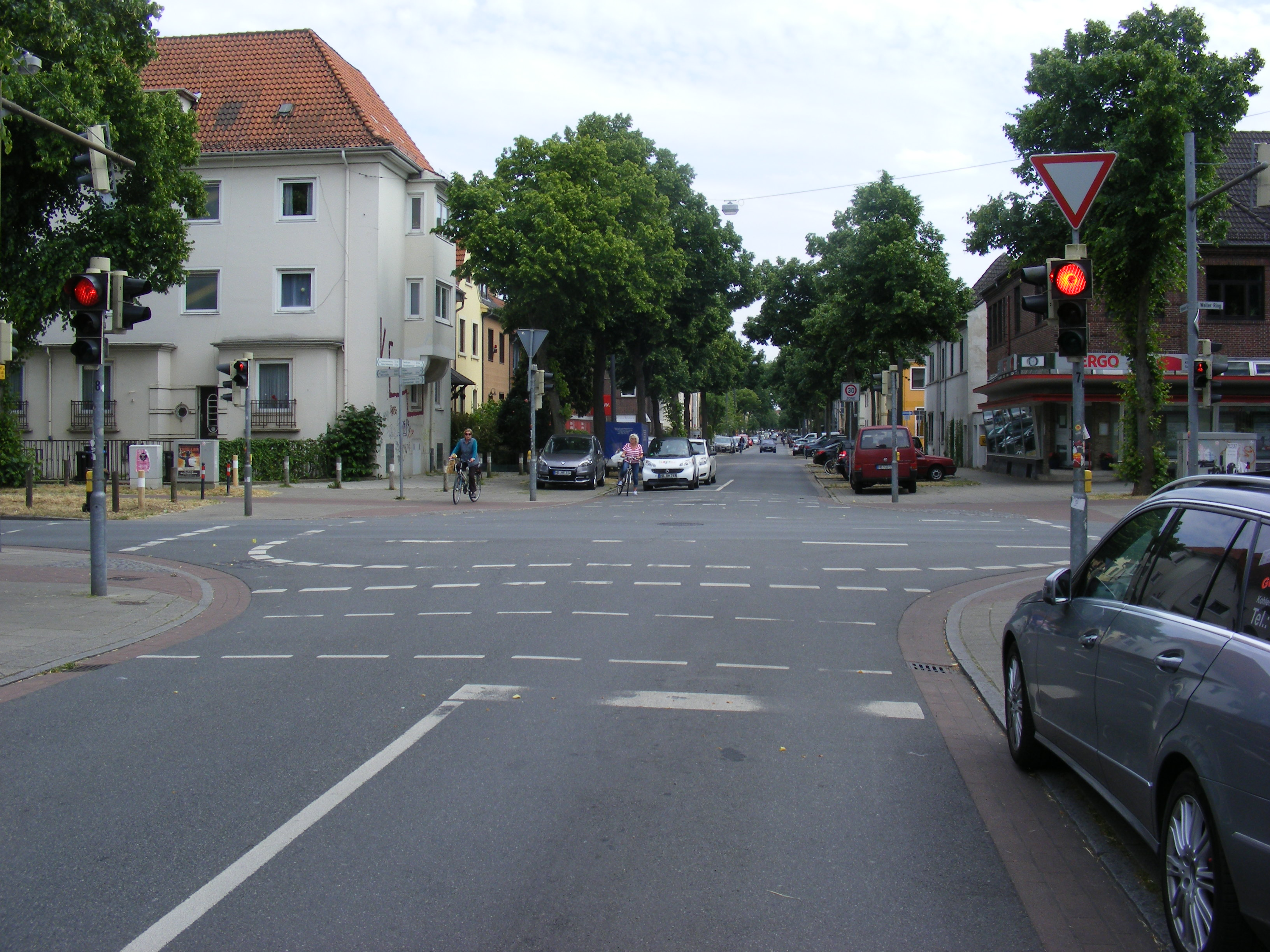 Vegesacker Straße in Bremen-Walle. Die einst hier vorhandenen Radwege wurden um 2000 in Verbindung mit der Ausschilderung als Veloroute aufgehoben. 2015 wurde eine Ausweisung als Fahrradstraße vorgeschlagen.